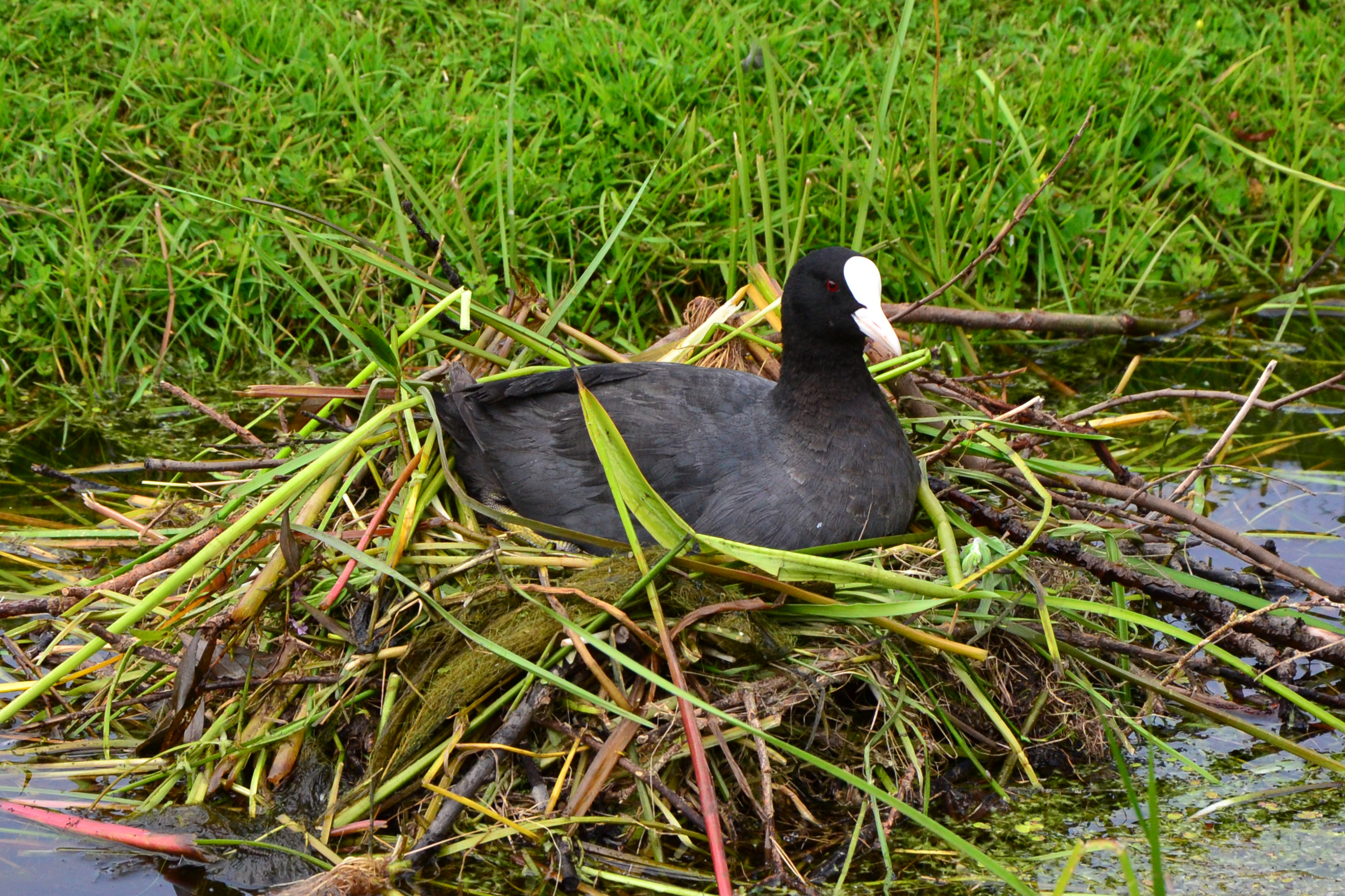 Blässhuhn (Fulica atra) im Nest beim Brüten